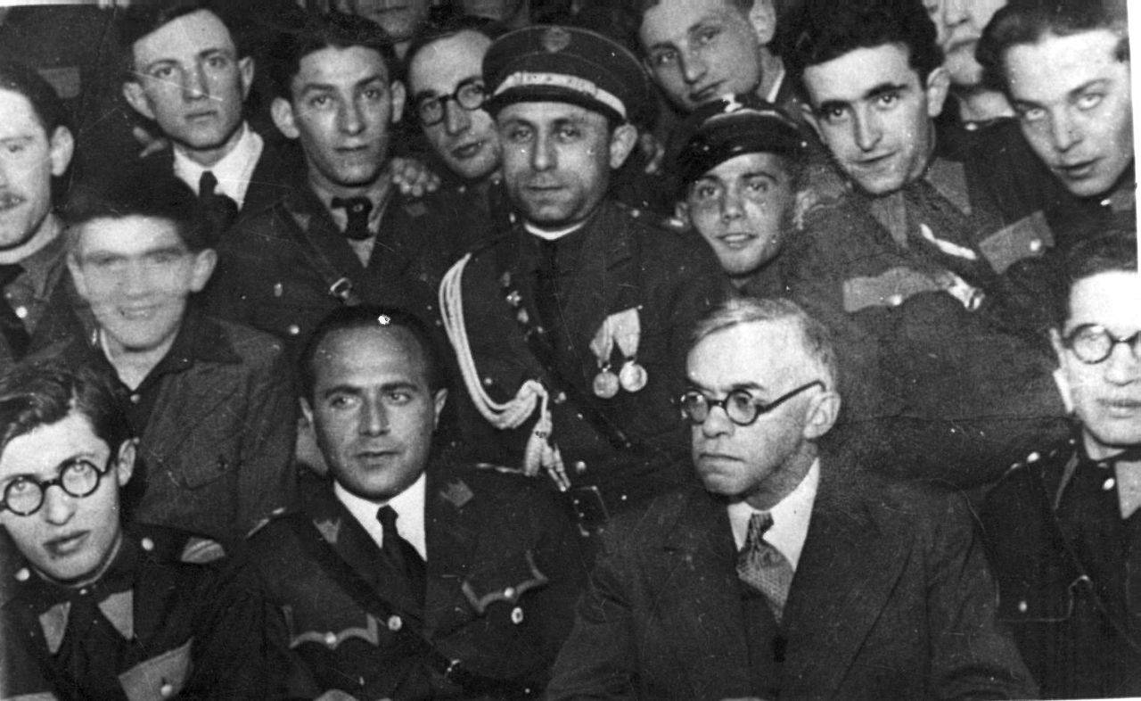 גרשון הנדל במדי בית"ר (עומד, שני מימין) בחברת זאב ז'בוטינסקי, אהרן צבי פרופס ומנחם בגין, בקן בית"ר ורשה, פולין, 1939